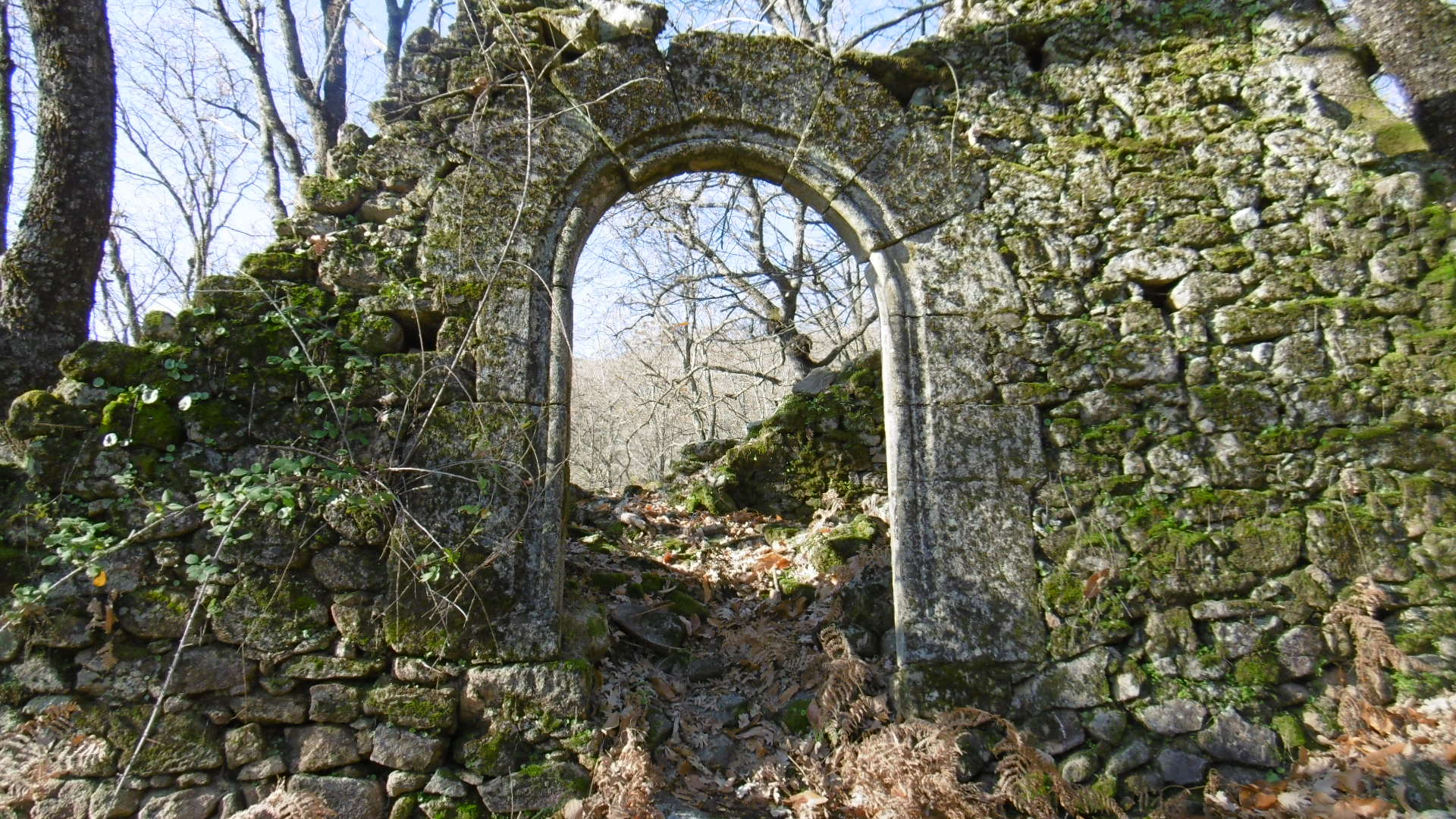 Portada d'accés al convent de Santiago de Montcalvo d'Acebo